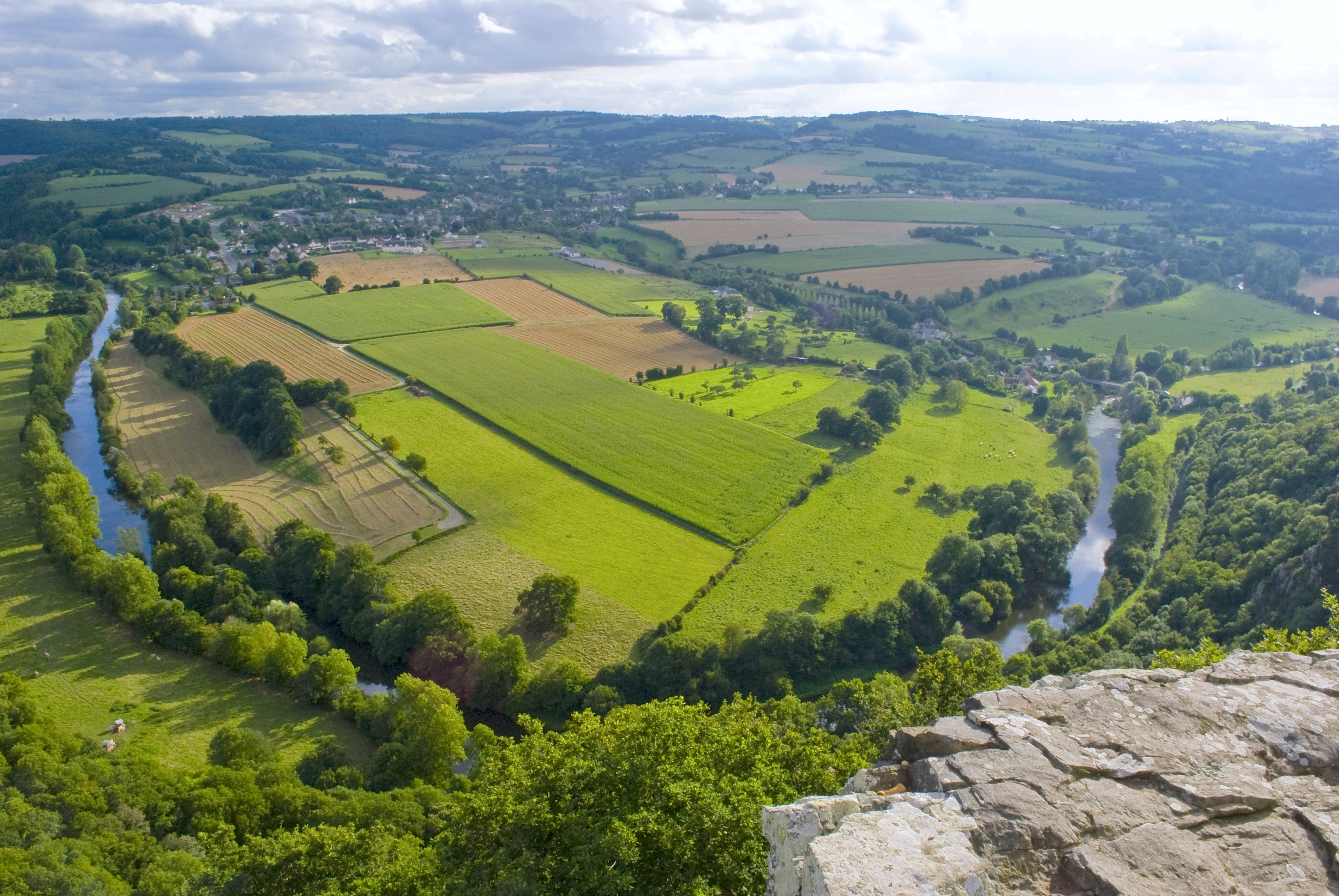 Paysage de la Suisse Normande. Boucle de l'Orne, près de Clécy